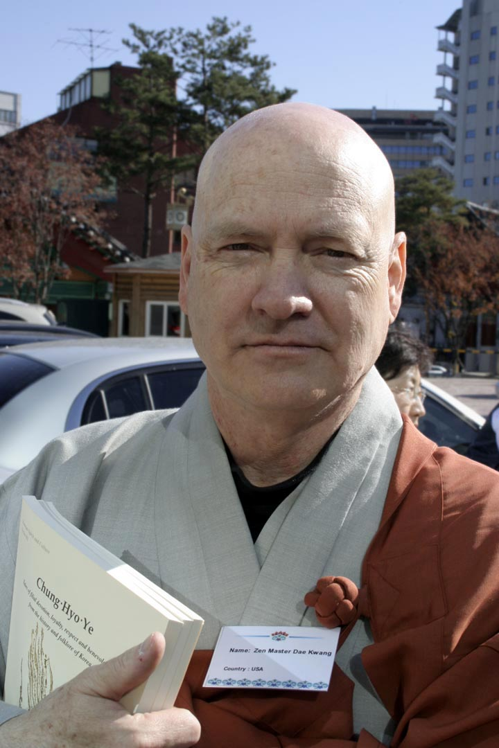 Zen master Dae Kwang at the Zen Master Seung Sahn Memorial 2007